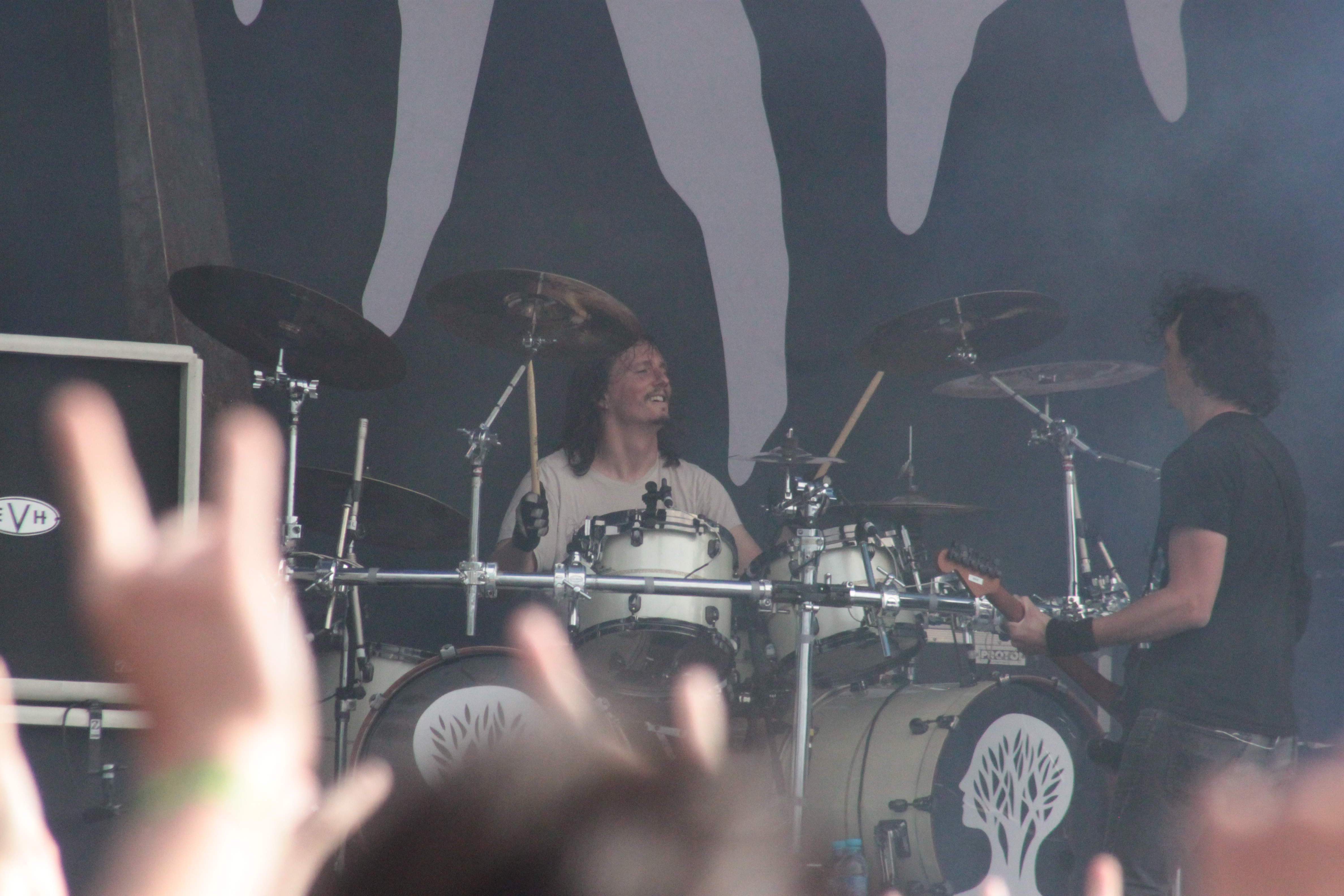 Mario Duplantier, Gojira, Hellfest 2013, Fr-44-Clisson.